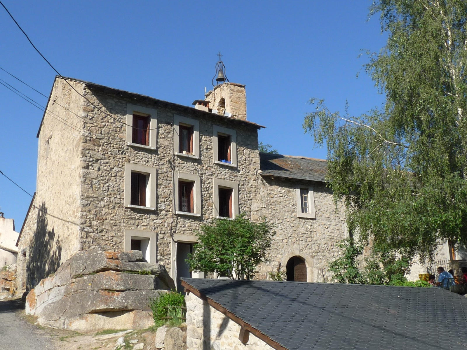 Eglise de Caudiès-de-Conflent, Pyrénées-Orientales, France